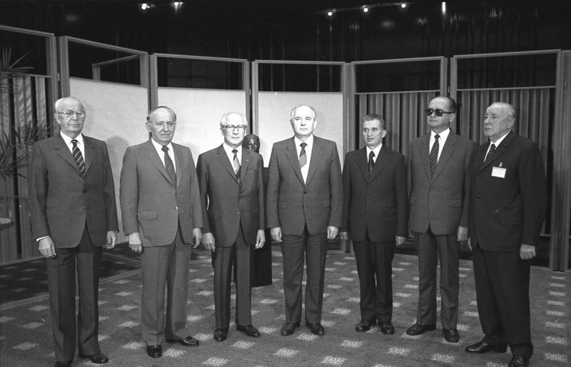 Berlin, Tagung Warschauer Pakt, Gruppenfoto ADN-ZB / Mittelstädt / 29.5.87 / Berlin: Tagung Zum Abschluß stellten sich die Leiter der Delegationen zur turnusmäßigen Tagung des Politischen Beratenden Ausschusses der Teilnehmerstaaten des Warschauer Vertrages den Fotografen. v.l.n.r.: Gustáv Husak (CSSR), Todor Shiwkow (VRB), Erich Honecker (DDR), Michail Gorbatschow (UdSSR), Nicolae Ceausescu (SRR), Wojciech Jaruzelski (VRP) und János Kádár (UVR). Abgebildete Personen, von links: Husak, Gustav Dr.: Präsident, 1. Sekretär des Zentralkomitees (ZK) der KP, CSSR Shiwkow, Todor: Vorsitzender des Staatsrates, Generalsekretär des ZK der KP, Bulgarien (GND 118637134) Honecker, Erich: Staatsratsvorsitzender, Generalsekretär des ZK der SED, DDR (GND 118553399) Gorbatschow, Michail: Präsident, Vorsitzender des Obersten Sowjets, Friedensnobelpreisträger, Sowjetunion Ceausescu, Nicolae: Präsident, Staatsratsvorsitzender, Generalsekretär des ZK der KP, Rumänien Jaruzelski, Wojciech: Staatspräsident, General, Polen Kádár, János: Vorsitzender des Zentralkomitees (ZK) der KP, Ungarn (GND 118559044)